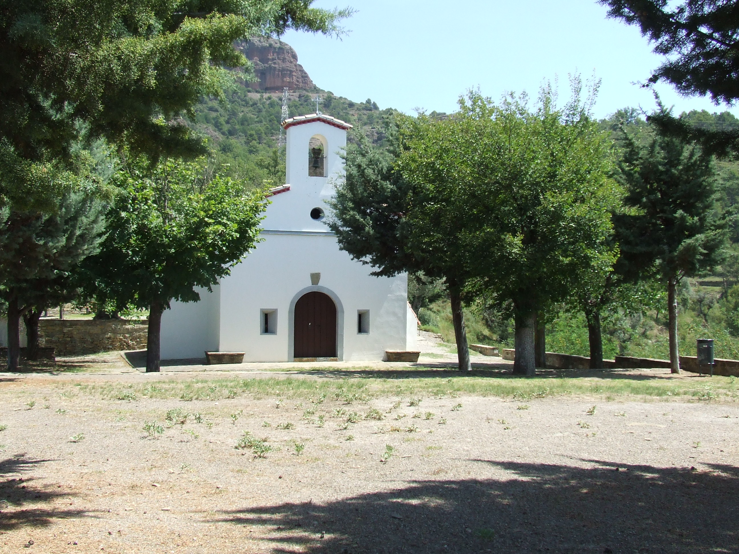 L'ermita moderna de Sant Miquel del Pui (la Pobla de Segur, Pallars Jussà)